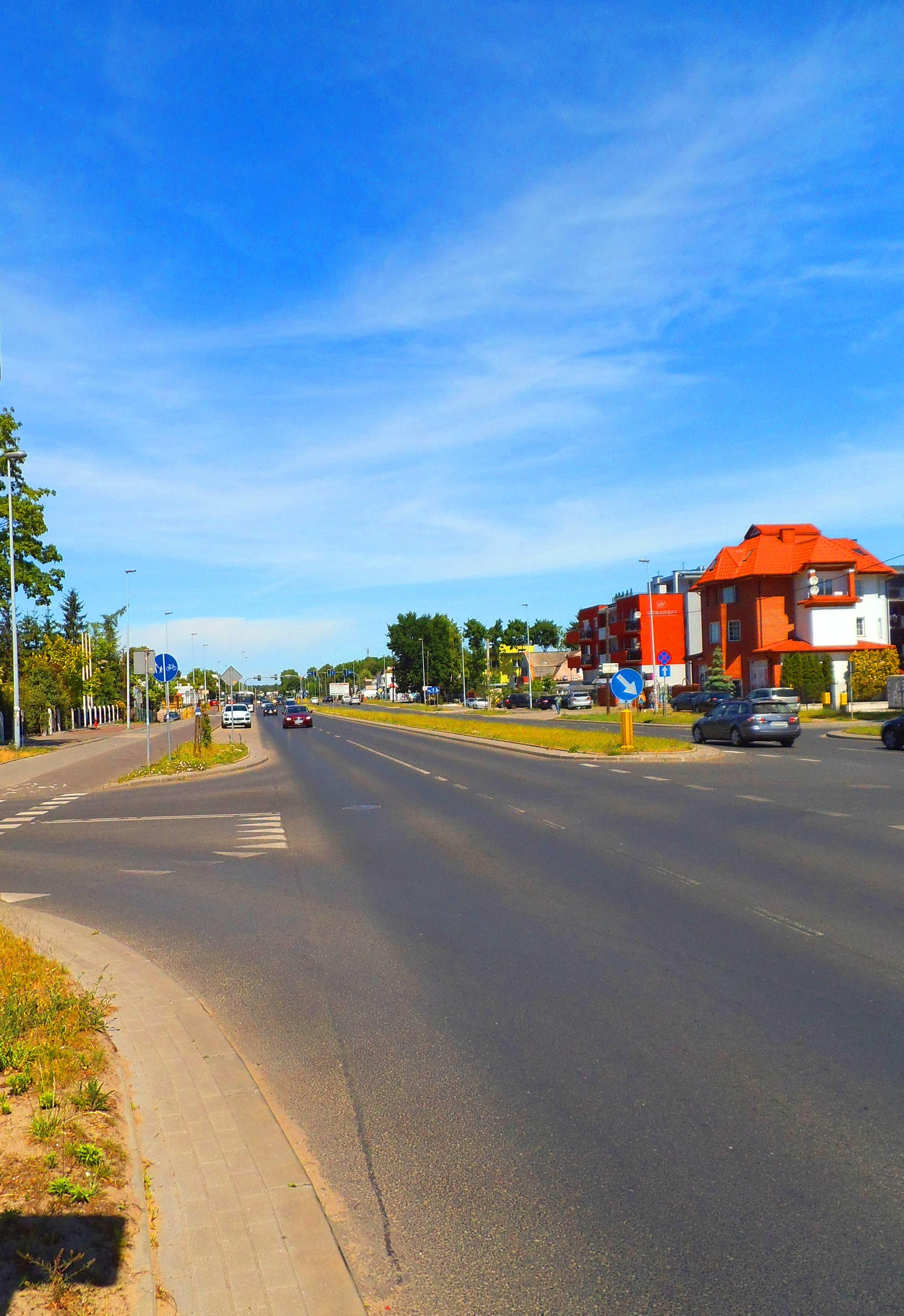 Trasa Staromostowa w Toruniu4